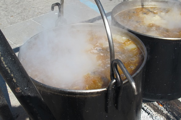 Caldera bullint.